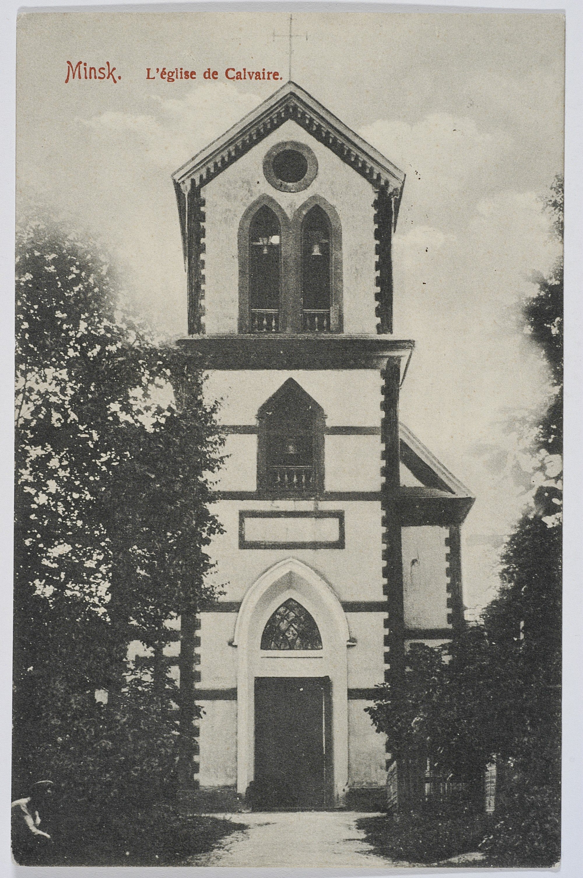 Беларуская (тарашкевіца): Менск (Miensk), Кальварыя (Kalvaryja)